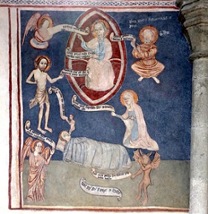 Középkori falkép a katolikus templom szentélyében: Vesszős György megítéltetése